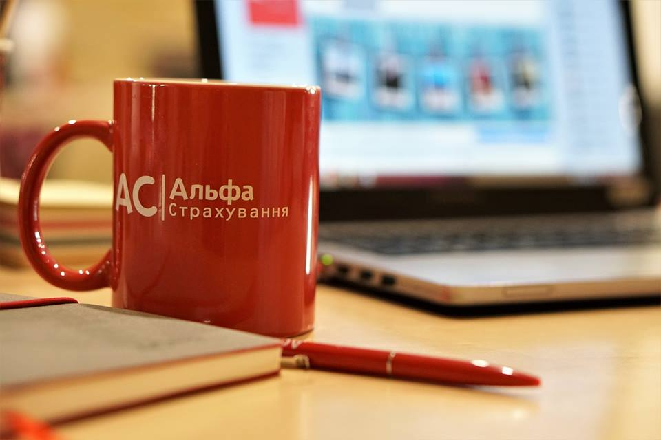 Чашки з логотипом компанії "Альфа Страхування"